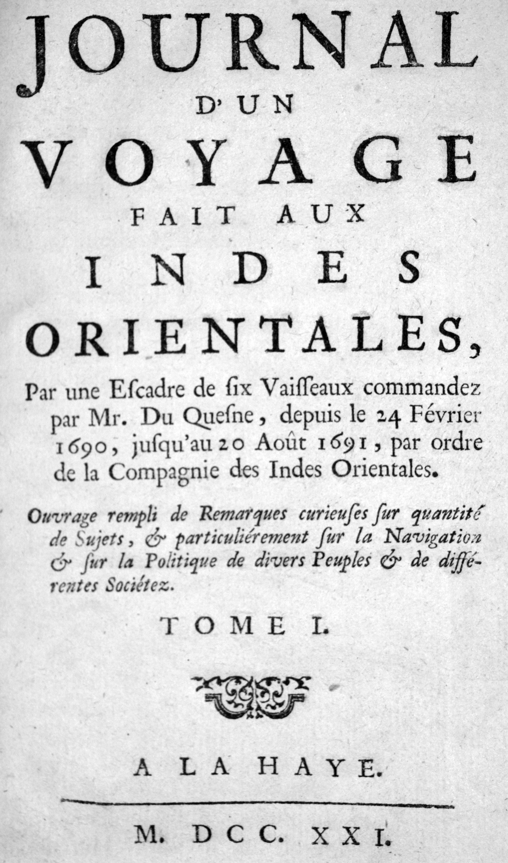 Page de titre